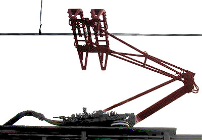 Pantograaf Mat'64, Alphen aan den Rijn, september 2003, eigen foto